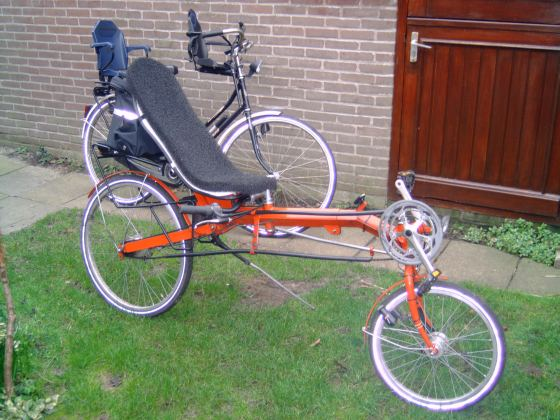 Sinner Record 20/26 onderstuur, eigen foto en vrij voor gebruik